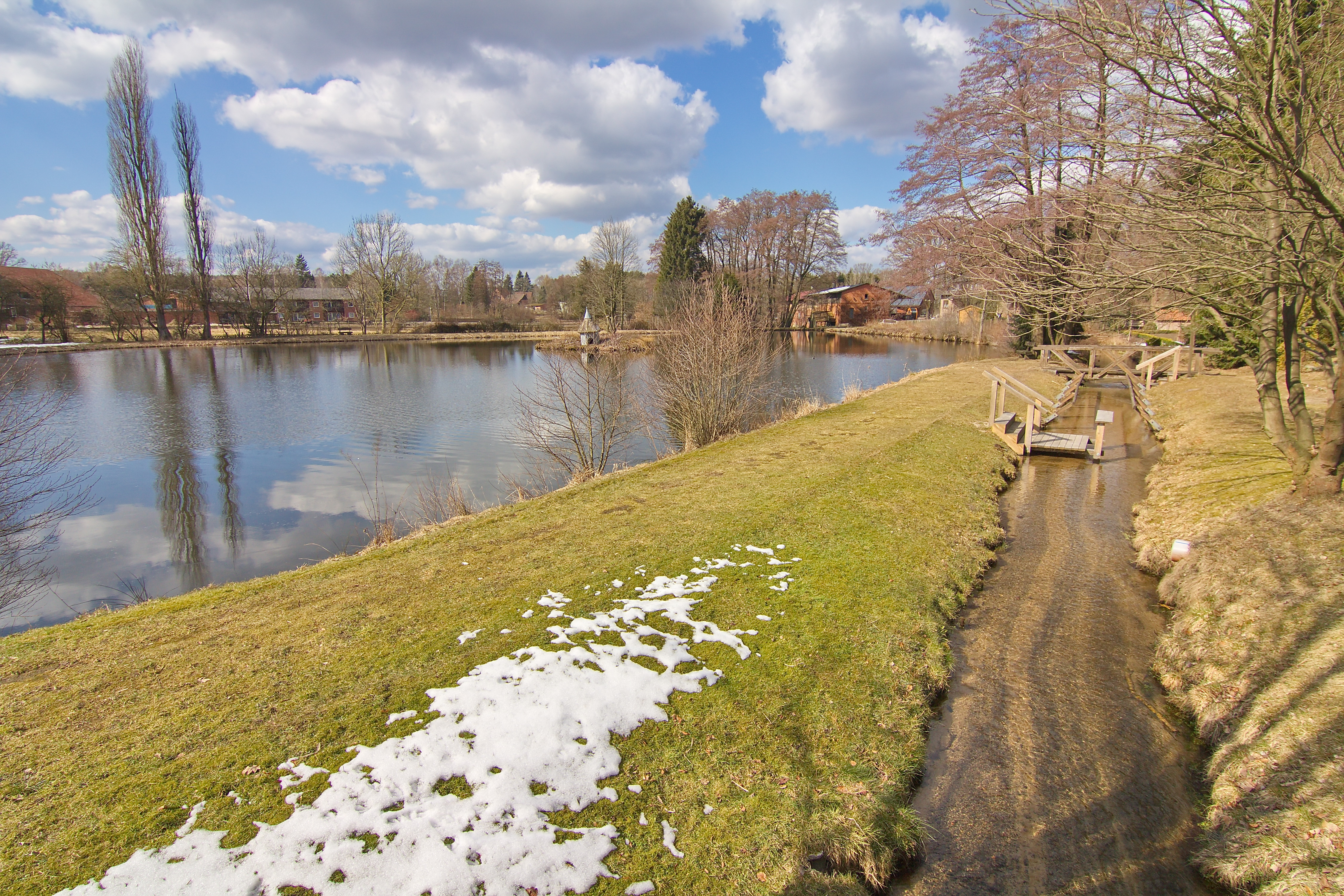 Ortsblick in Hösseringen (Suderburg), Niedersachsen, Deutschland